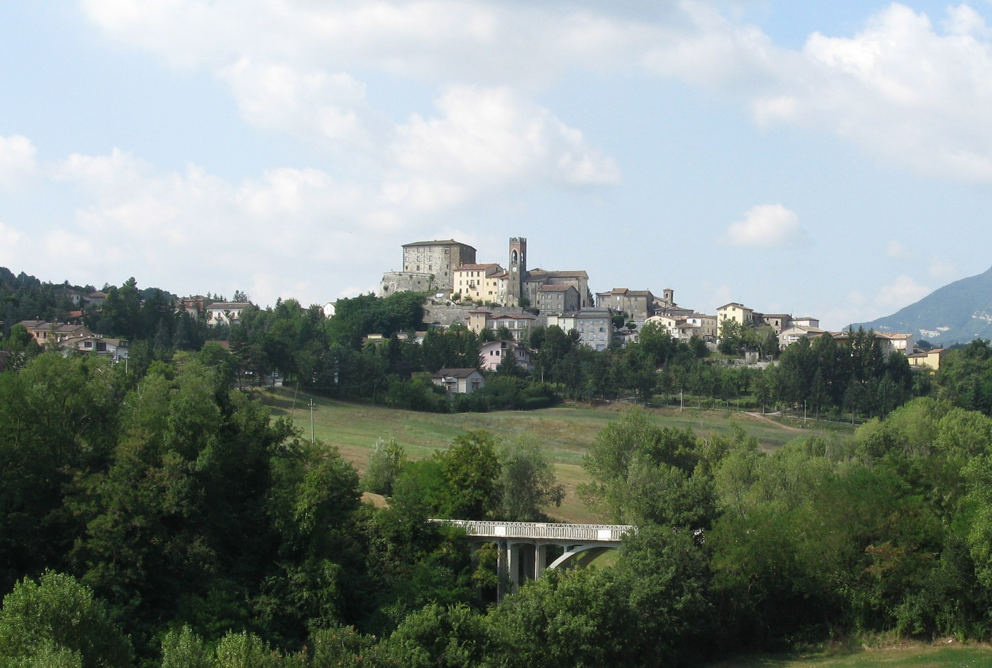 Panorama di Monte Cerignone.